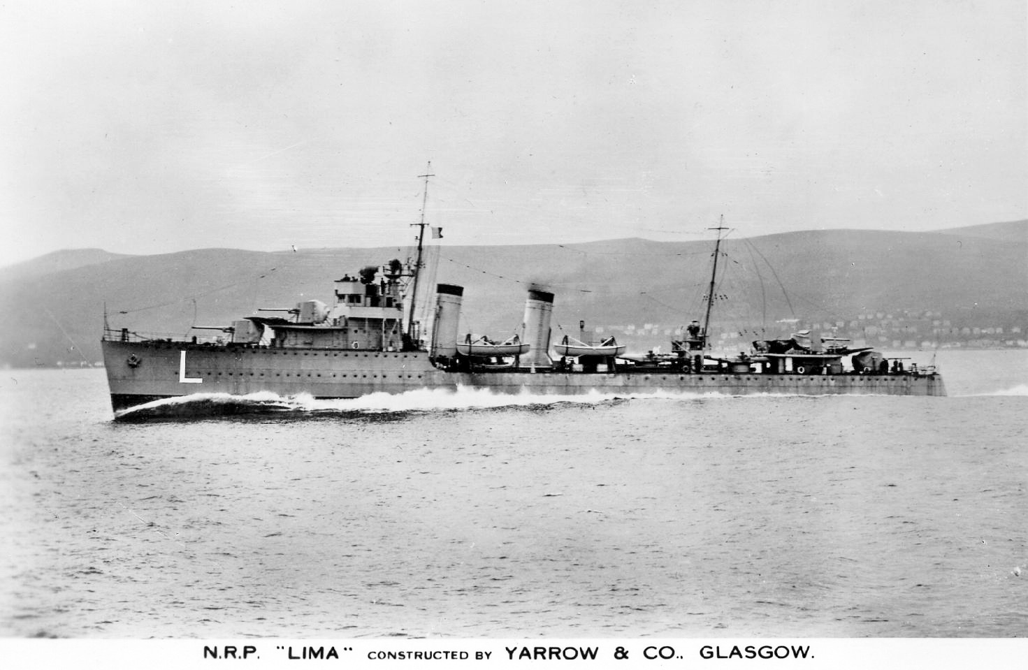 Der bei Yarrow gebaute Zerstörer LIMA